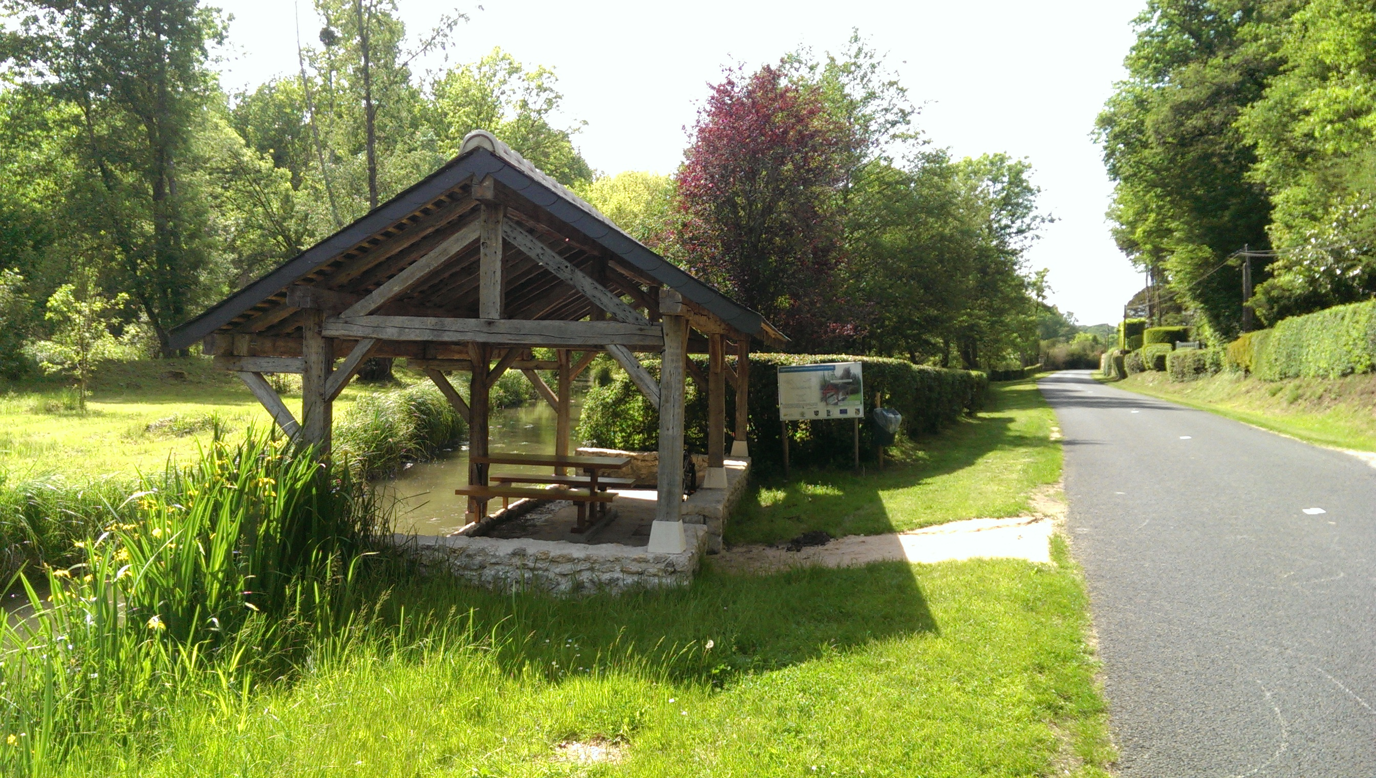 Le lavoir Saint-Louis à Chambon-sur-Cisse, situé sur la Bouère, dérivation de la Cisse. Il a été reconstruit à l'identique de l'ancien lavoir démonté en 1975, et inauguré le 12 avril 2017.